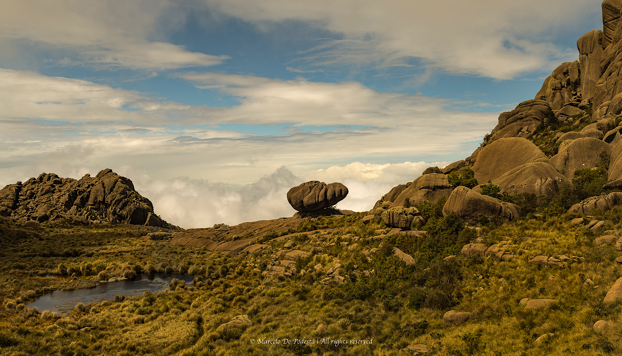 Parque Nacional de Itatiaia e ao centro a pedra da tartaruga